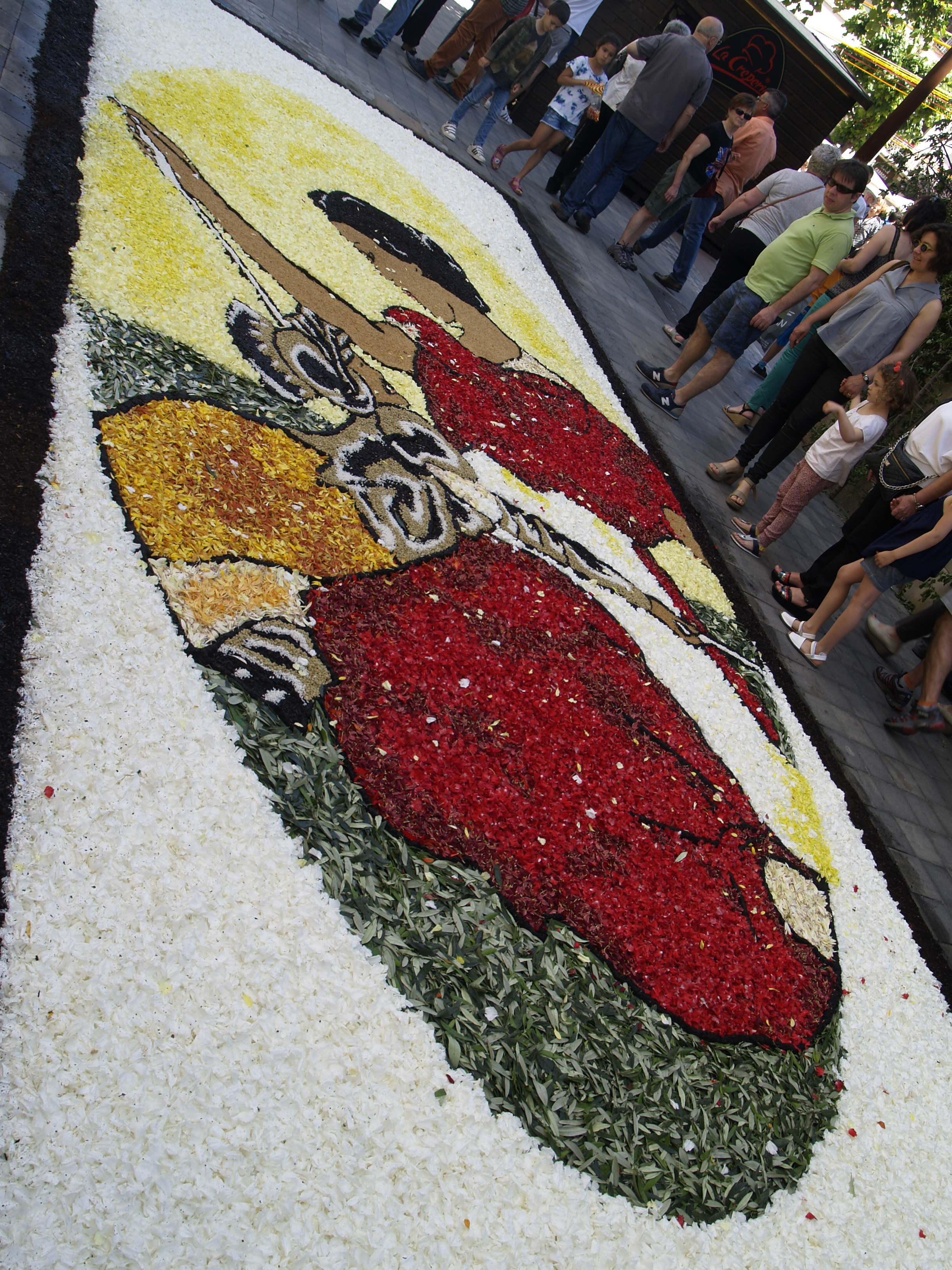 Alfombras de Corpus de la Garriga This is a photography of a Folklore festival in Spain (Wikidata id Q21479929).